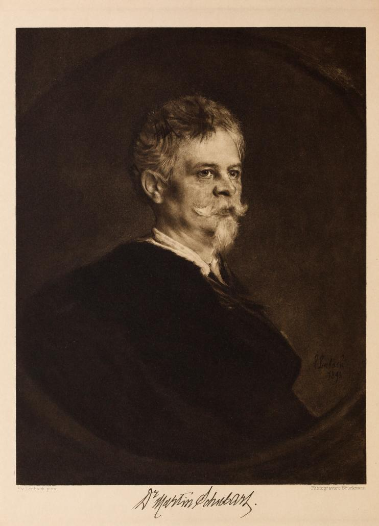 Martin Schubart, portrait by Franz von Lenbach, frontispice in Gemalde-Sammlung des Verewigten Herrn Dr. Martin Schubart. Mit dem Bilde und dem Vorwort des Verstorbenen. Sowie Einer Einfuhrung von Dr. H. Pallman. 1899